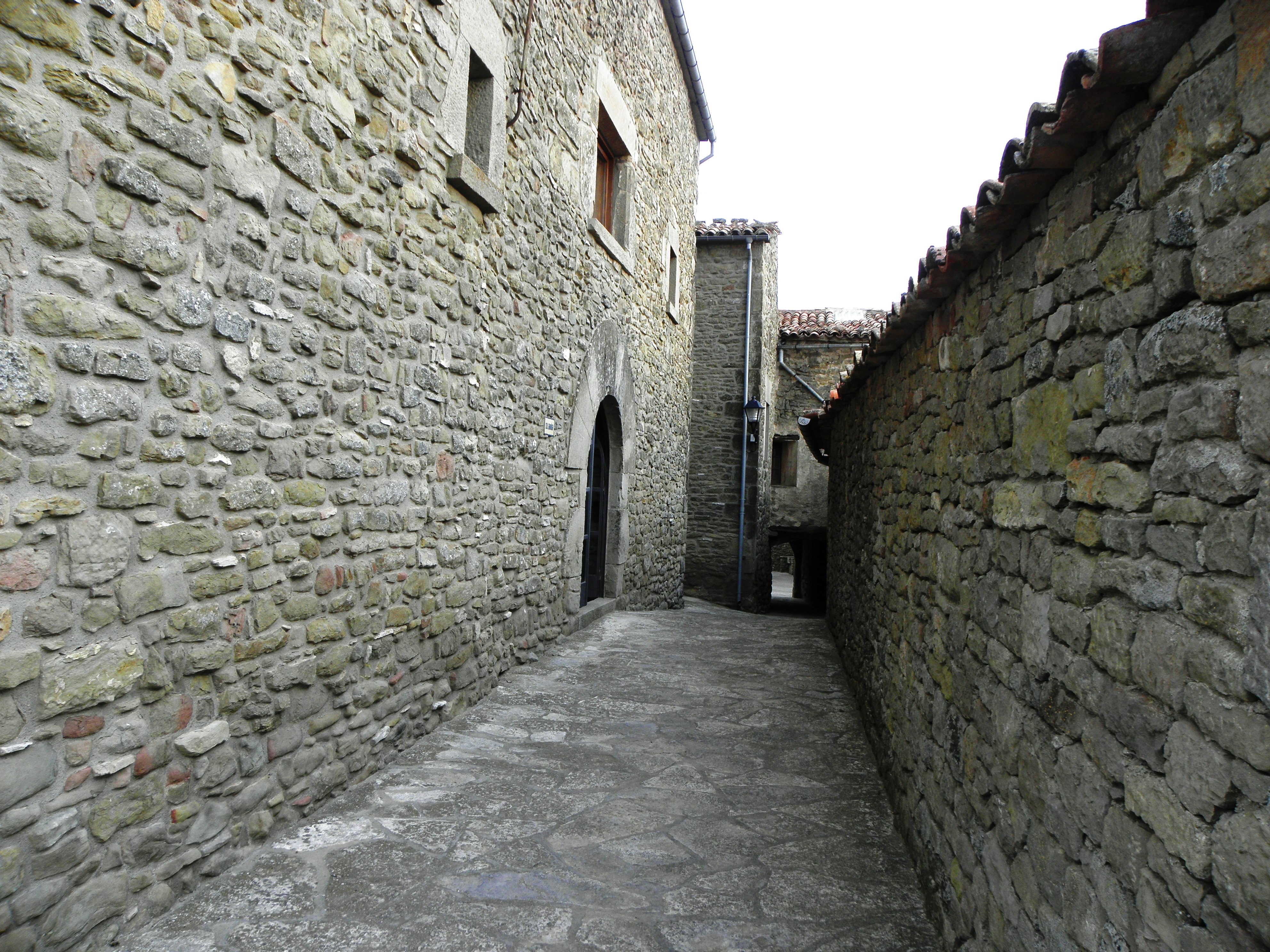 Carrer de Prades de la Molsosa (La Molsosa, Solsonès). Al fons del carre, el portal que dóna accès a la plaça major.